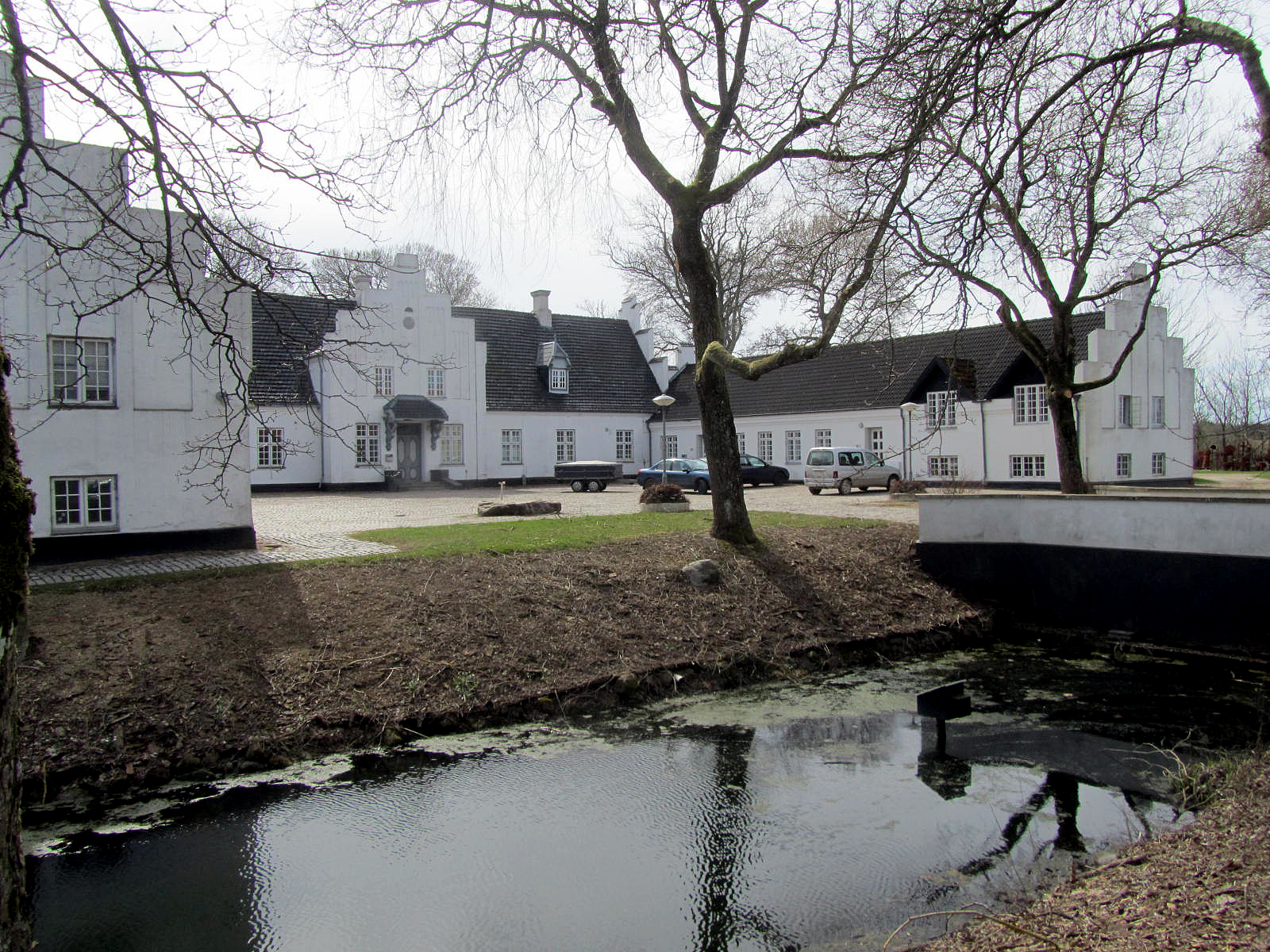 Brandbjerg